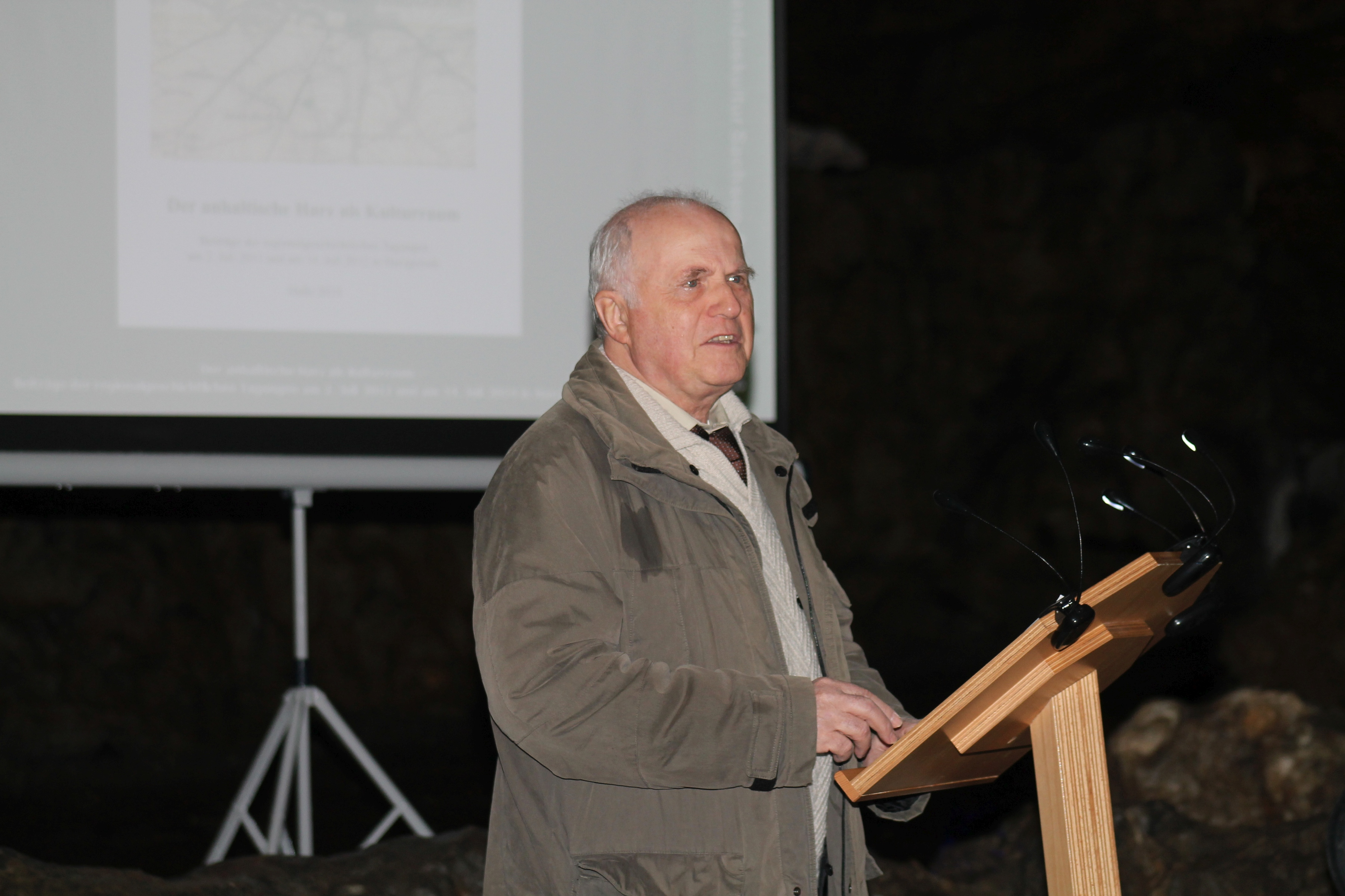 Eckhard Oelke, emeritierter Professor der Martin-Luther-Universität Halle. Veranstaltung "Neue Harzliteratur" am 24. Januar 2015 in der Baumannshöhle, Rübeland, Sachsen-Anhalt, Deutschland.